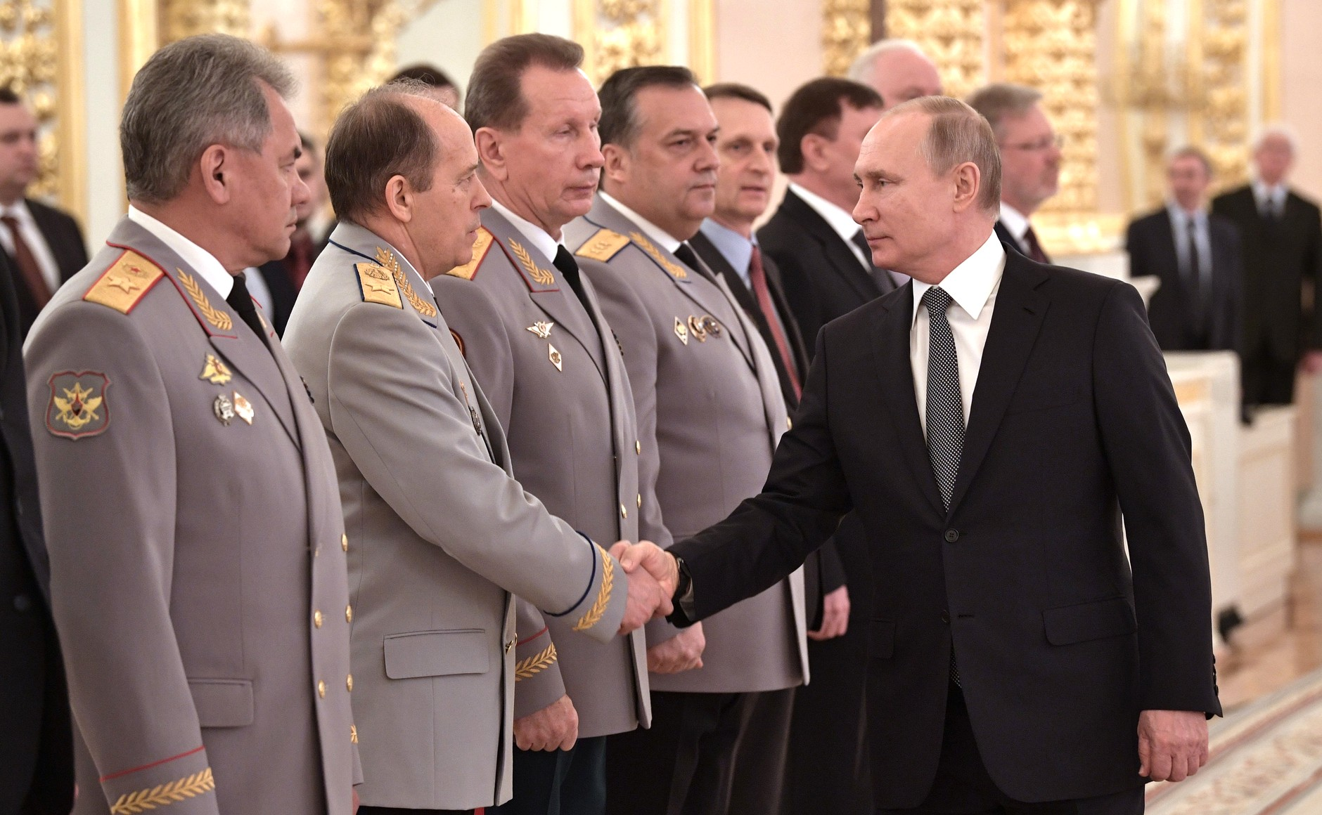 Церемония представления офицеров, назначенных на высшие командные должности.